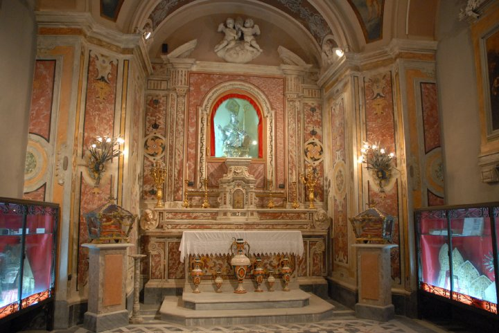 Cappella di San Modestino, patrono di Avellino